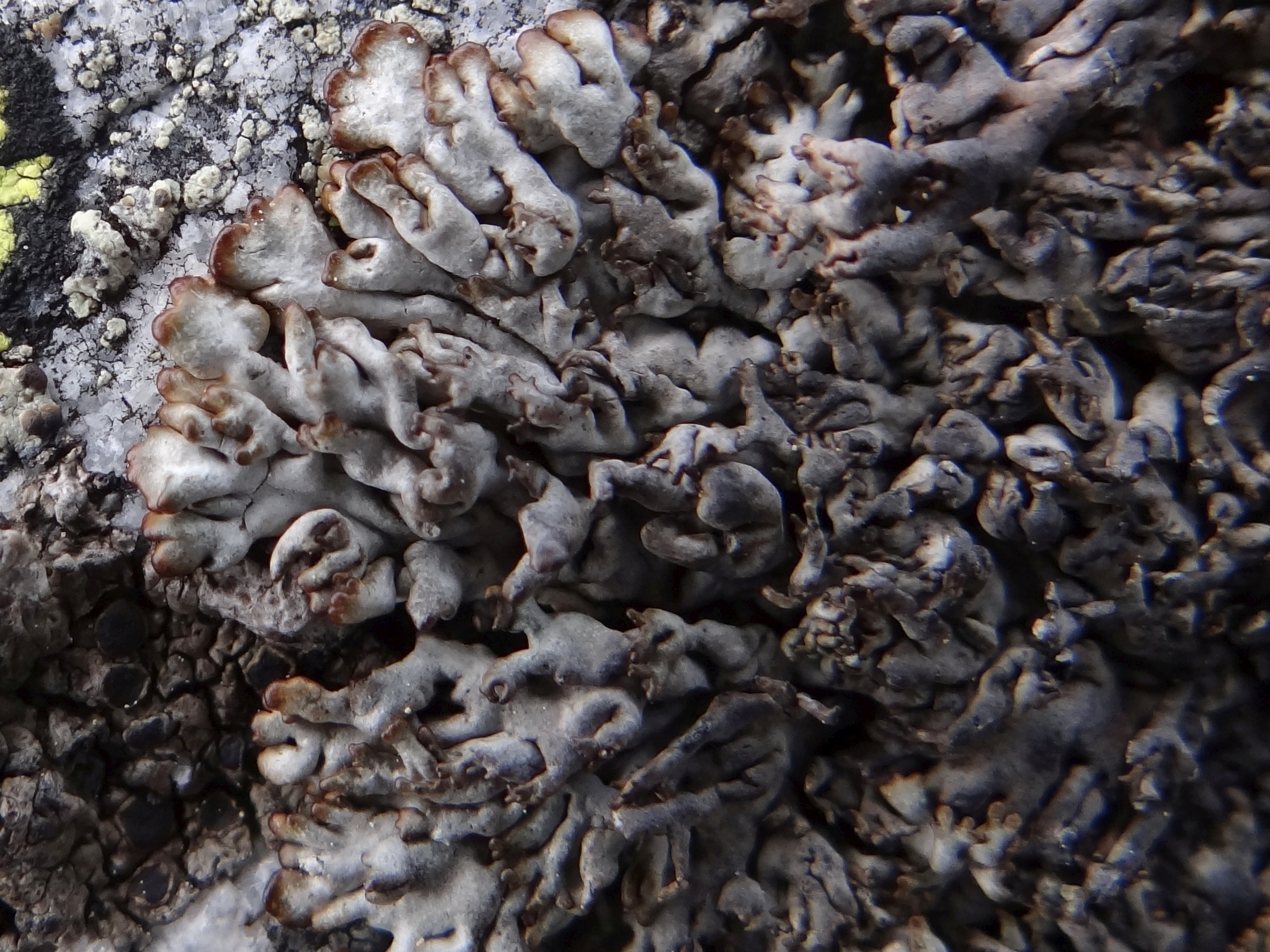 Montanelia panniformis (location: Poland, Tatra Mountains, Czerwony Grzbiet Małołączniaka)